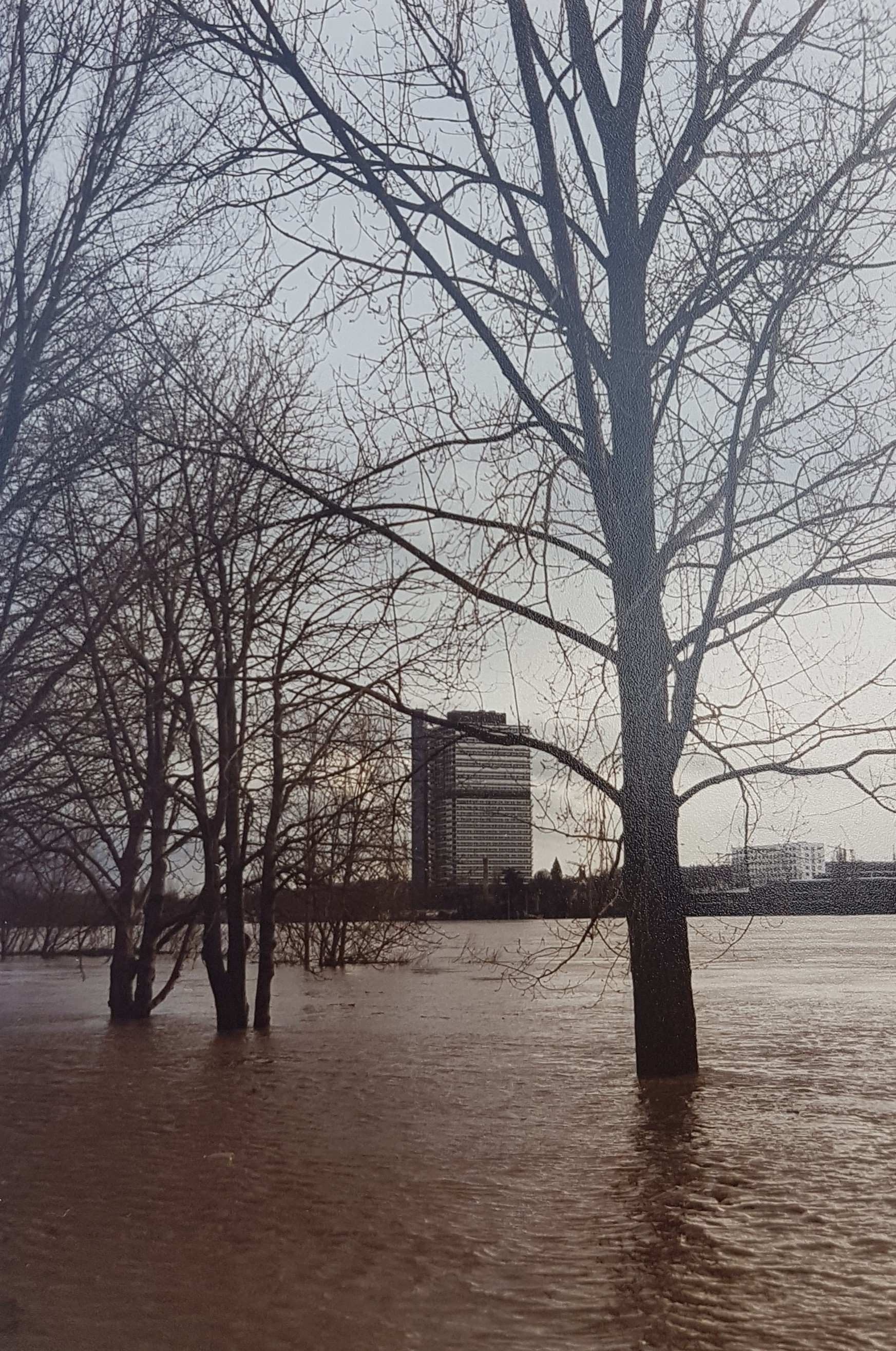 Sicht auf Bonn vom Beueler Ufer aus mit dem Langen Eugen beim Rheinhochwasser im Dezember 1993.